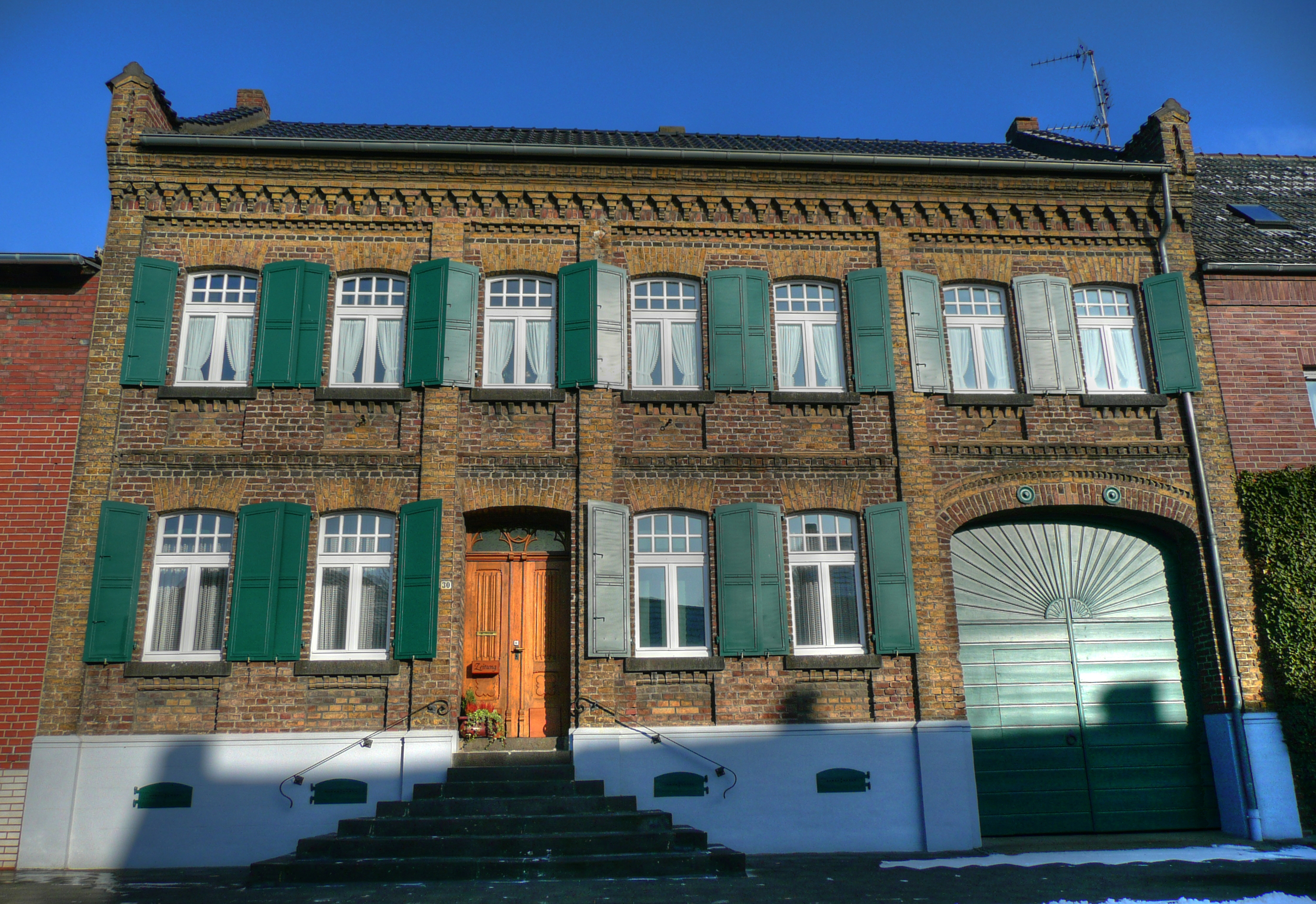 Anwesen inManheim (Stadt Kerpen)